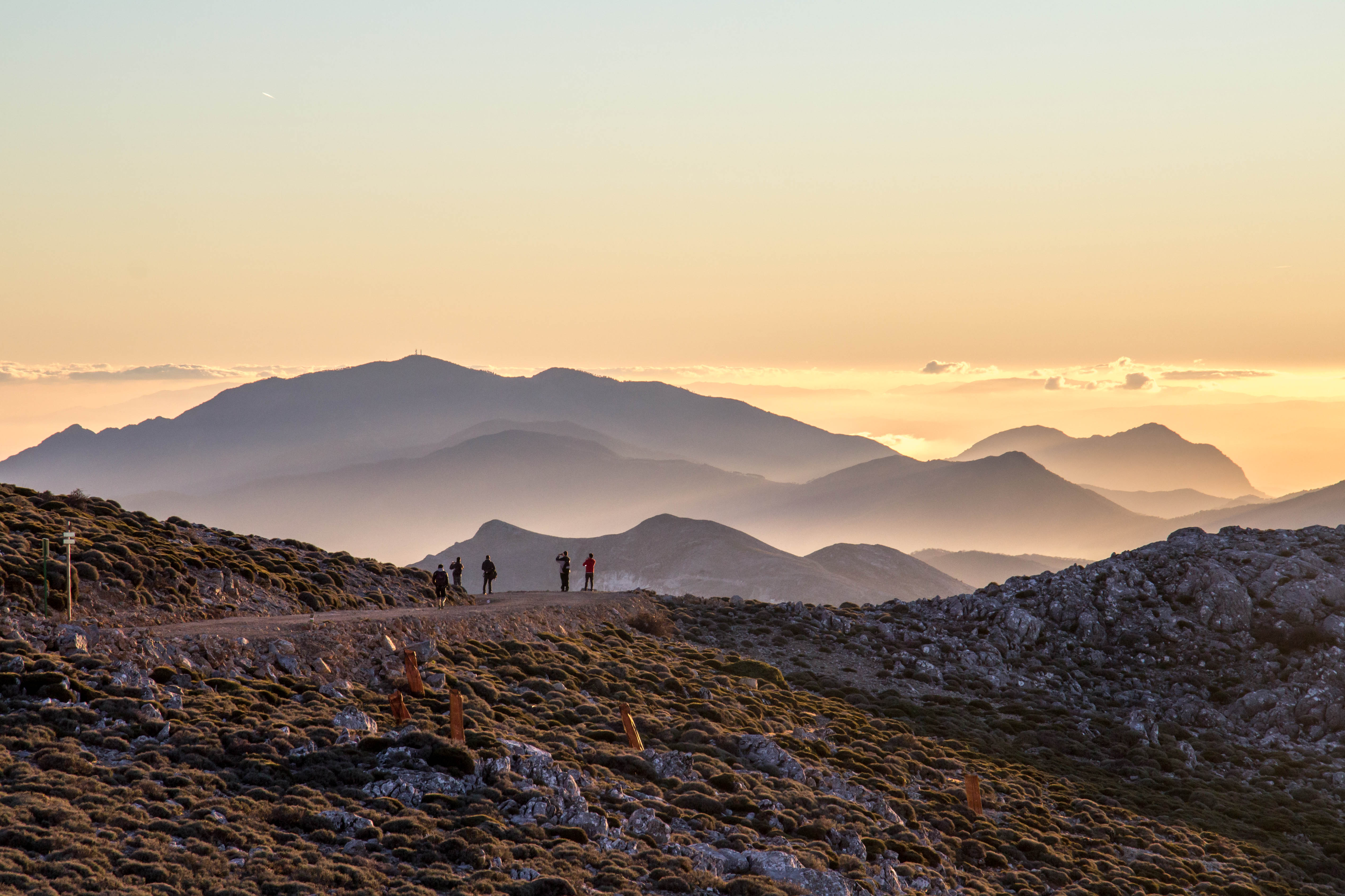 Parque natural de la Sierra de las Nieves, viendo el atardecer antes de marcharnos This is a photography of a Special Area of Conservation in Spain with the ID: ES6170006. Natura2000 entry, EEA entry